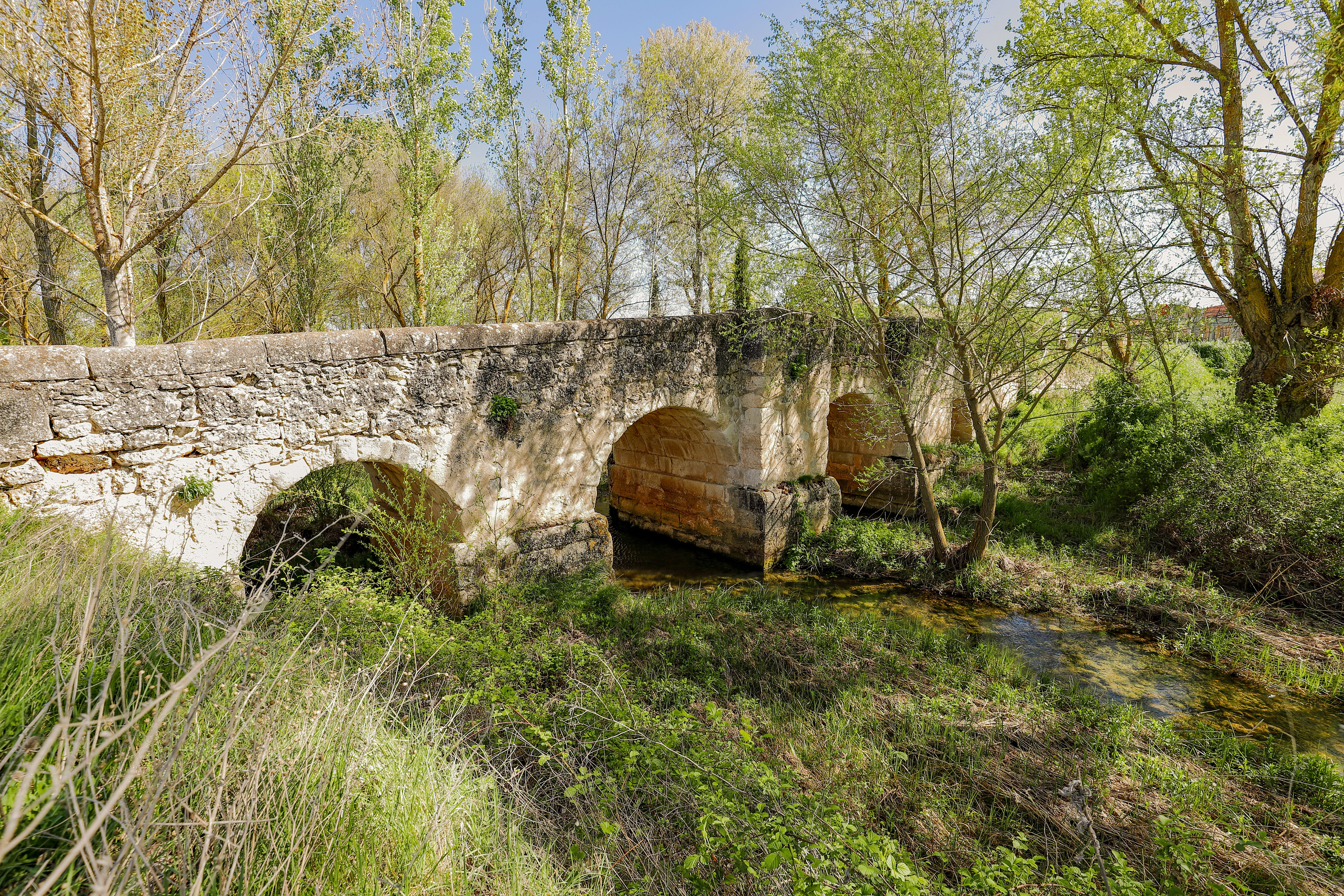 Pinilla Trasmonte es un municipio de la comarca Ribera del Duero, en la provincia de Burgos.